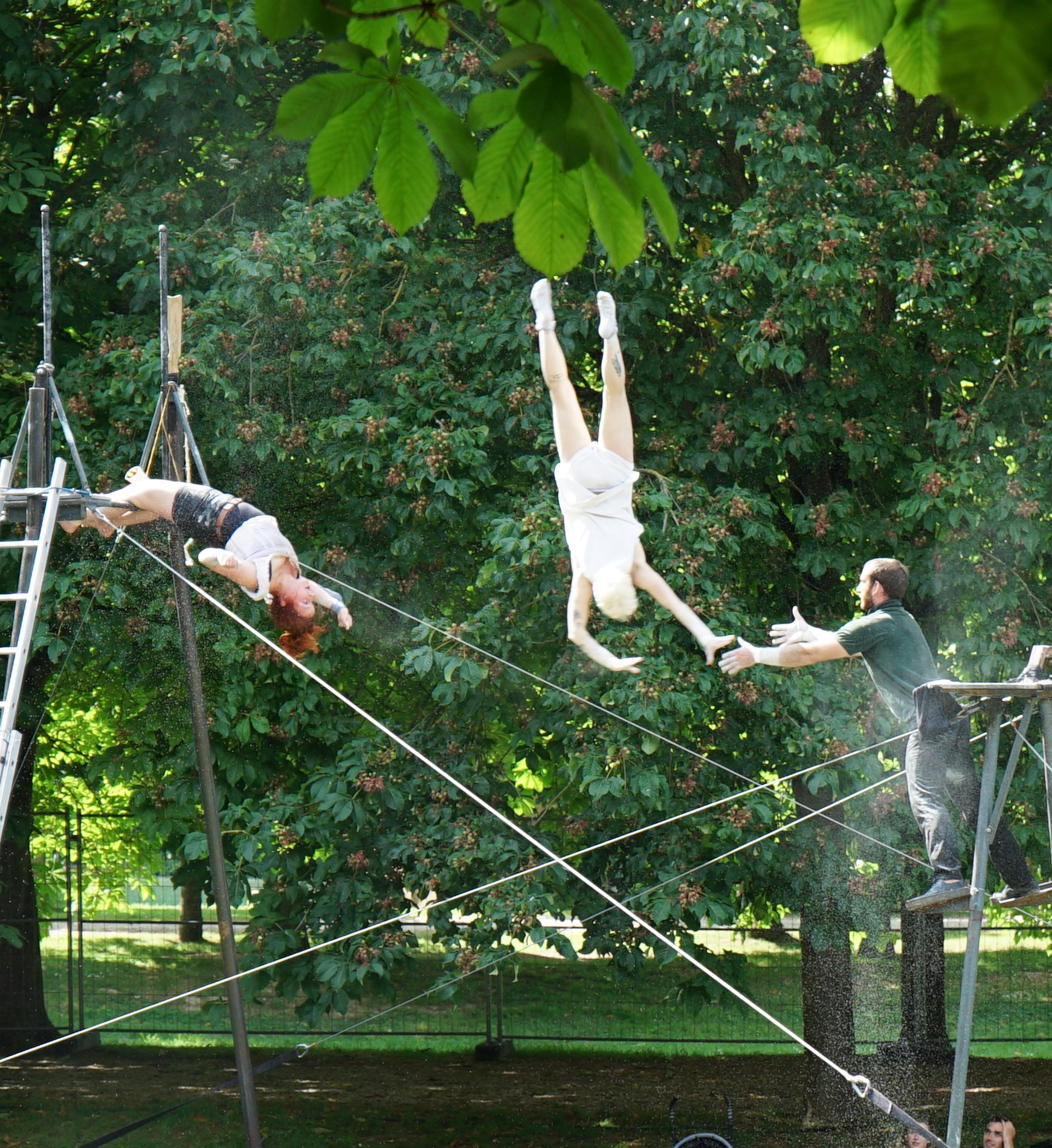 lors de furies 2015 la compagnie Marcel et ses droles de dames dans le spectacle Miss Dolly.